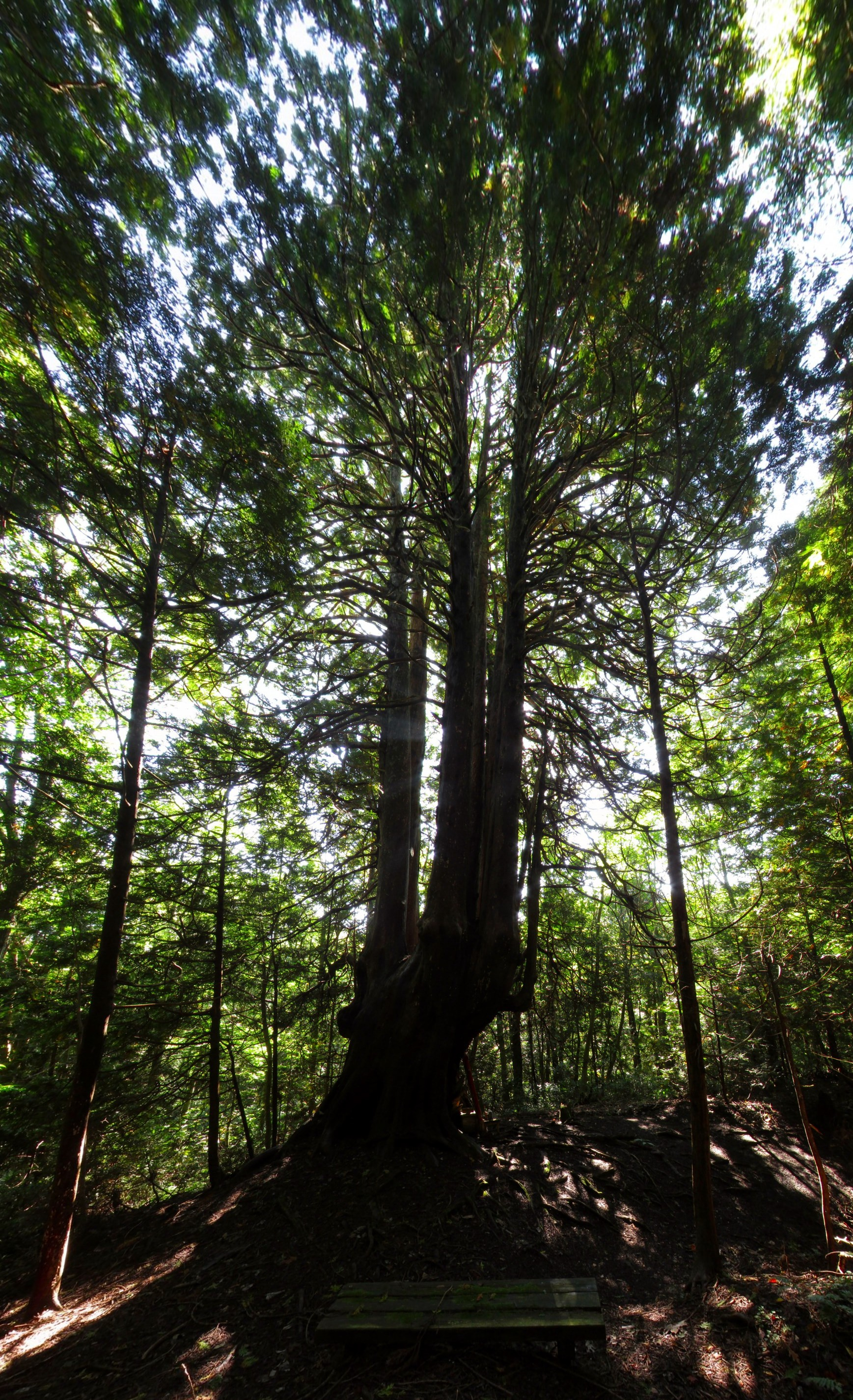 十二本ヤス,Zyunihonyasu(side)